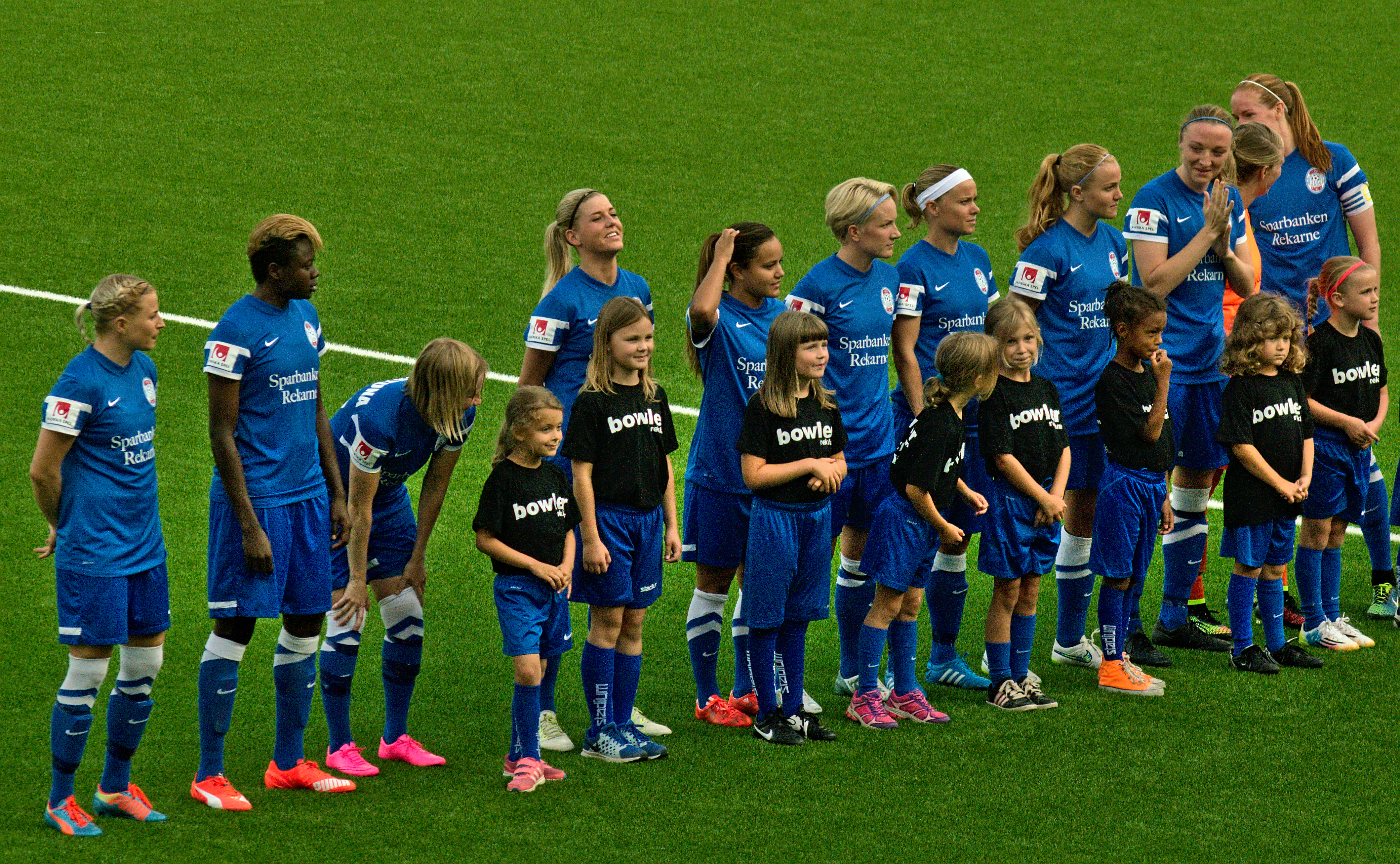 Eskilstuna United - FC Rosengård, Tunavallen i Eskilstuna 5 augusti 2015. Startelvor.